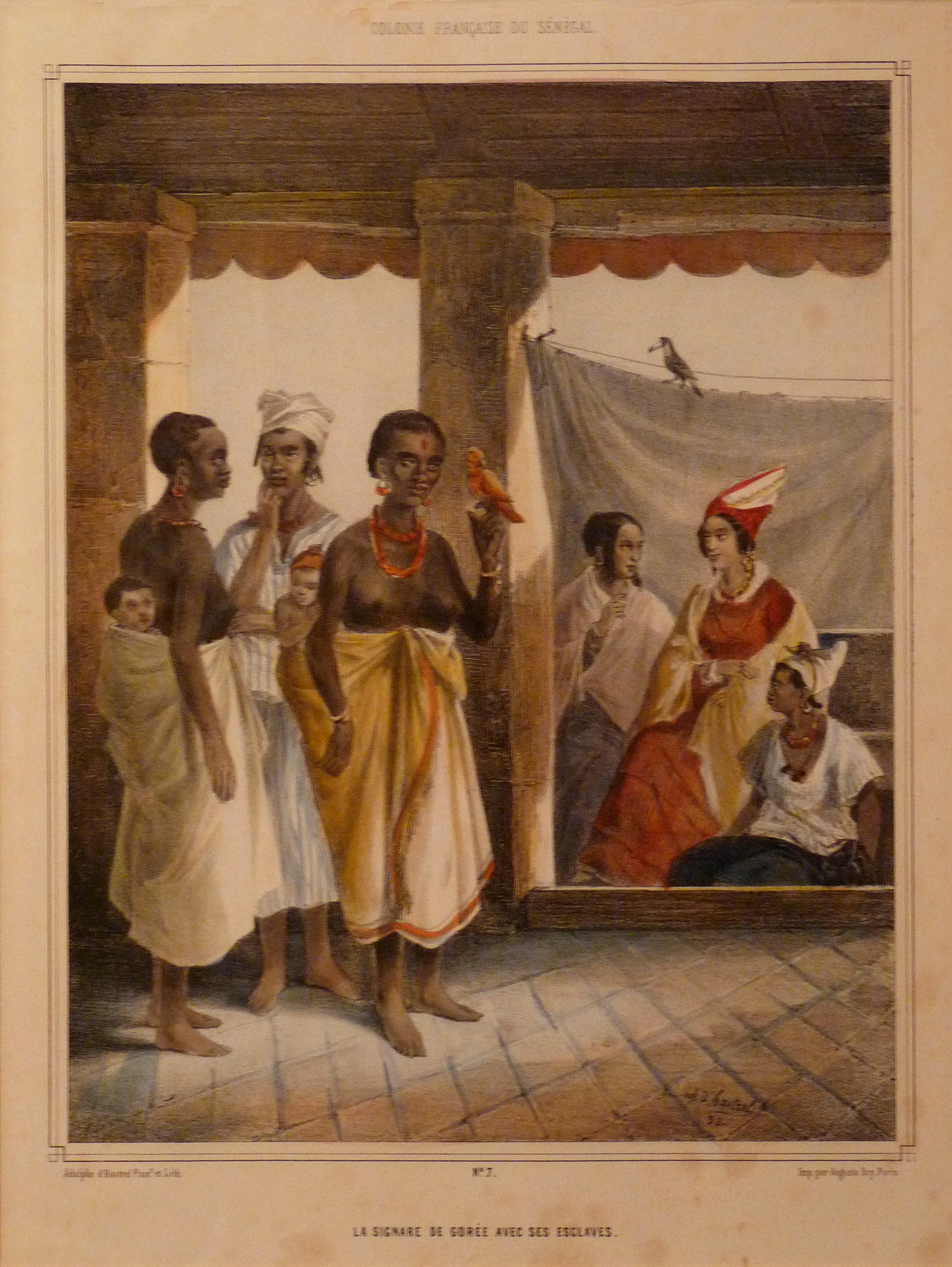 La Signare de Gorée avec ses esclaves, gravure polychrome d'Adolphe d'Hastrel. Musée de la Compagnie des Indes (Lorient)